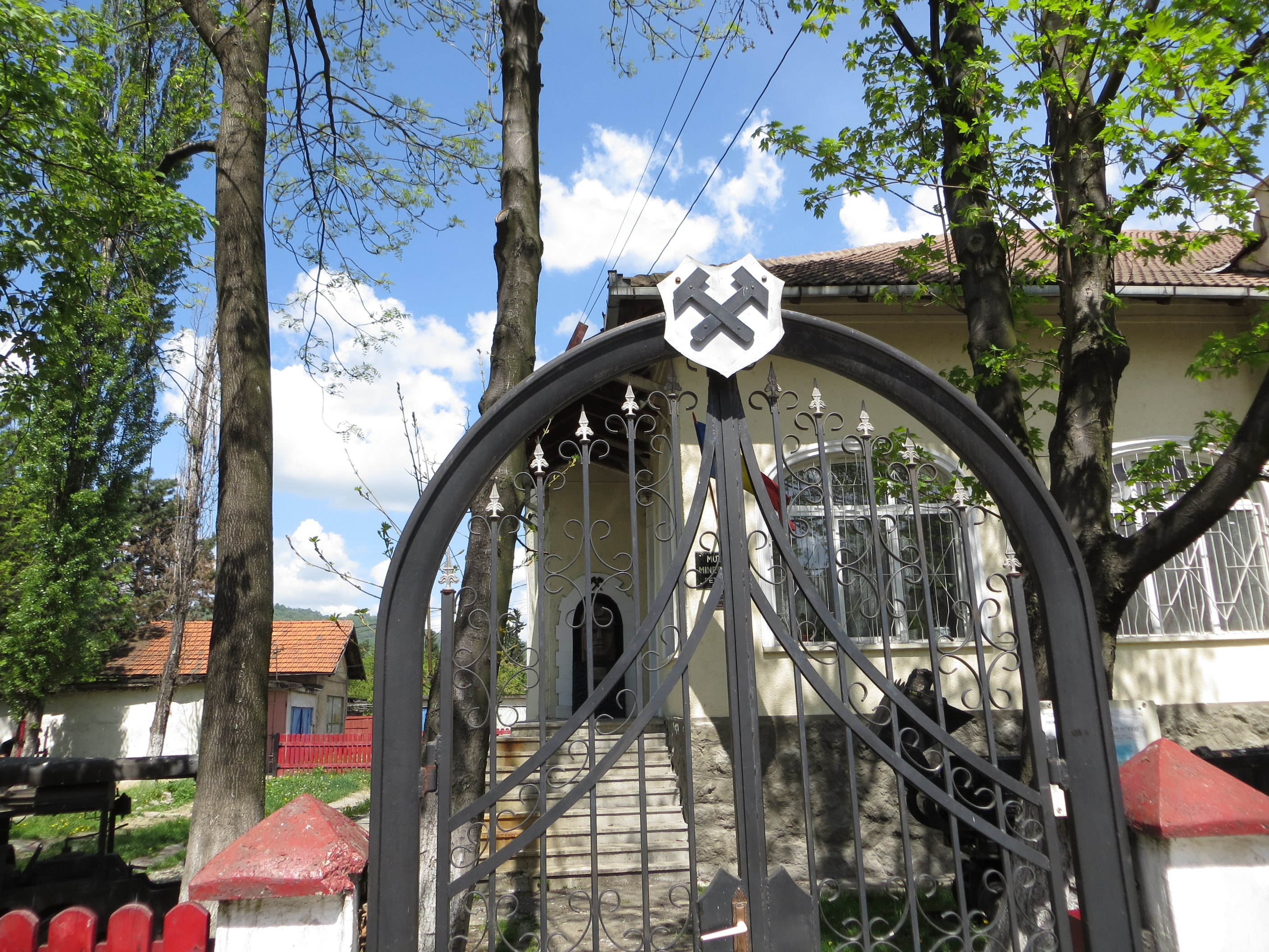 Primul sediu al S.A.R. Petroșani, azi Muzeul Mineritului